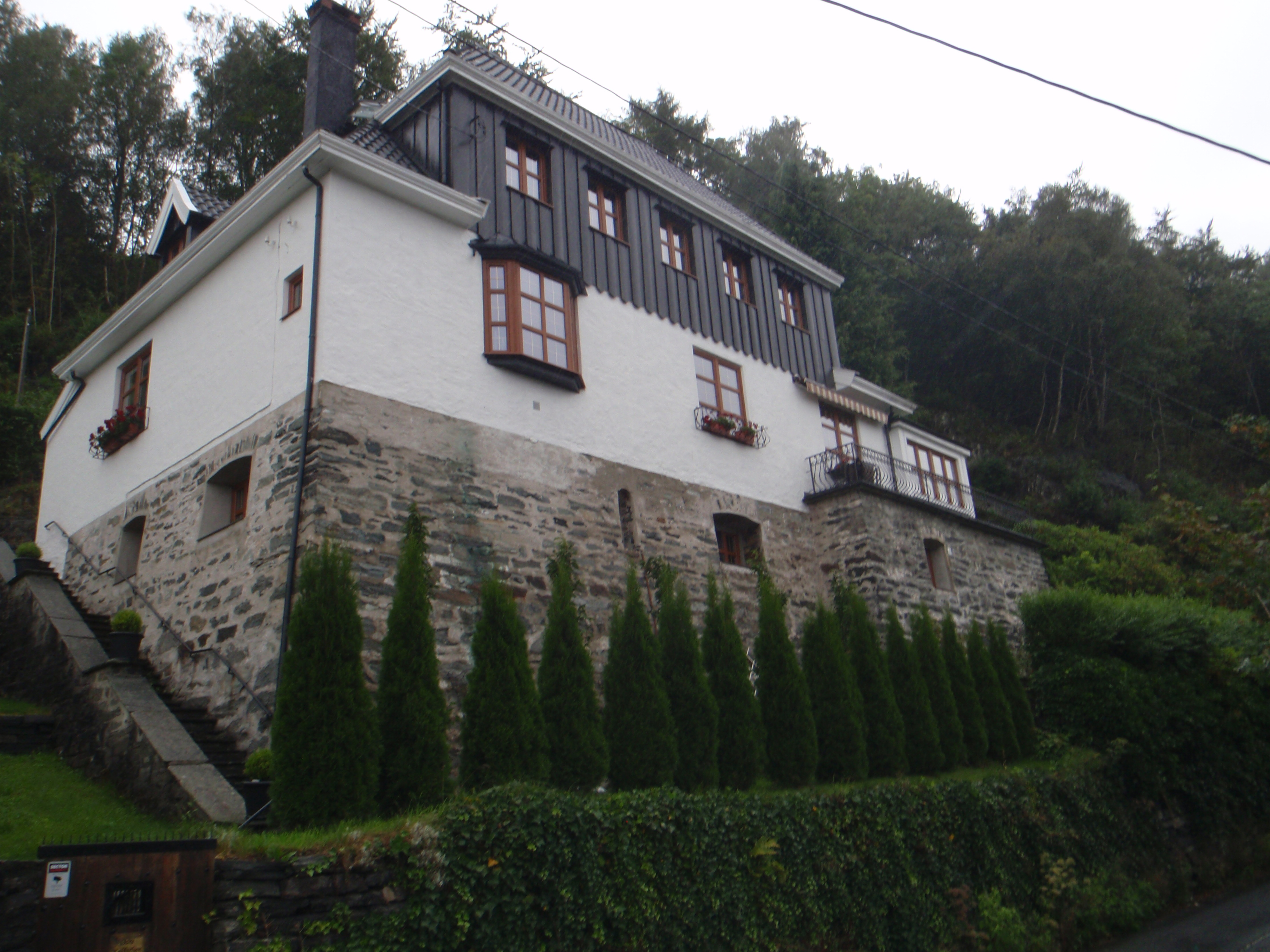 Bygning av Bergenarkitekten Egill Reimers